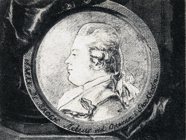 Abraham de Broen. Based on a drawing by J. L. Caton.